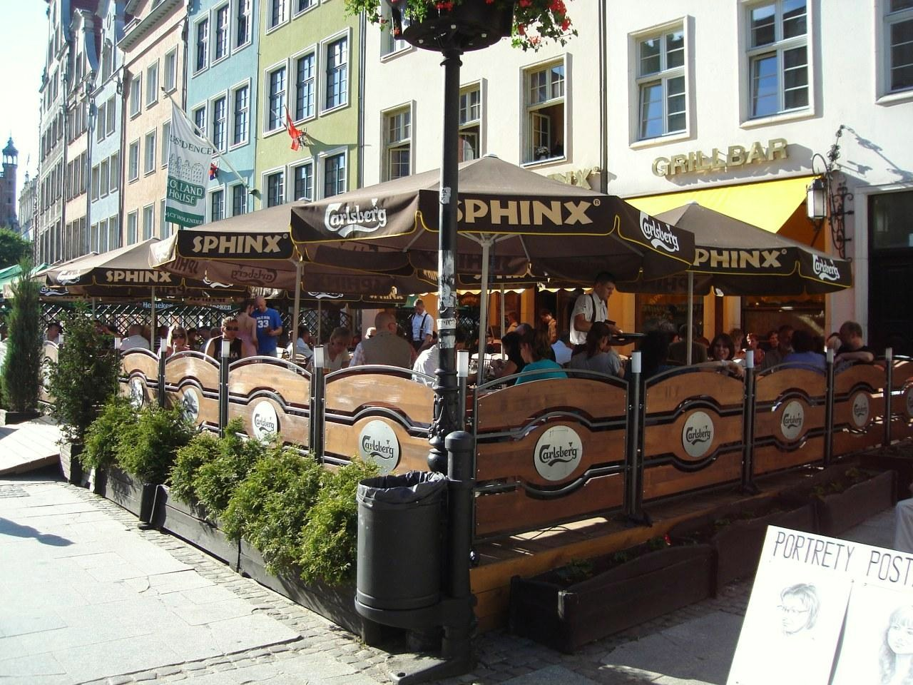 Restauracja Sphinx w Gdańsku, Długi Targ.